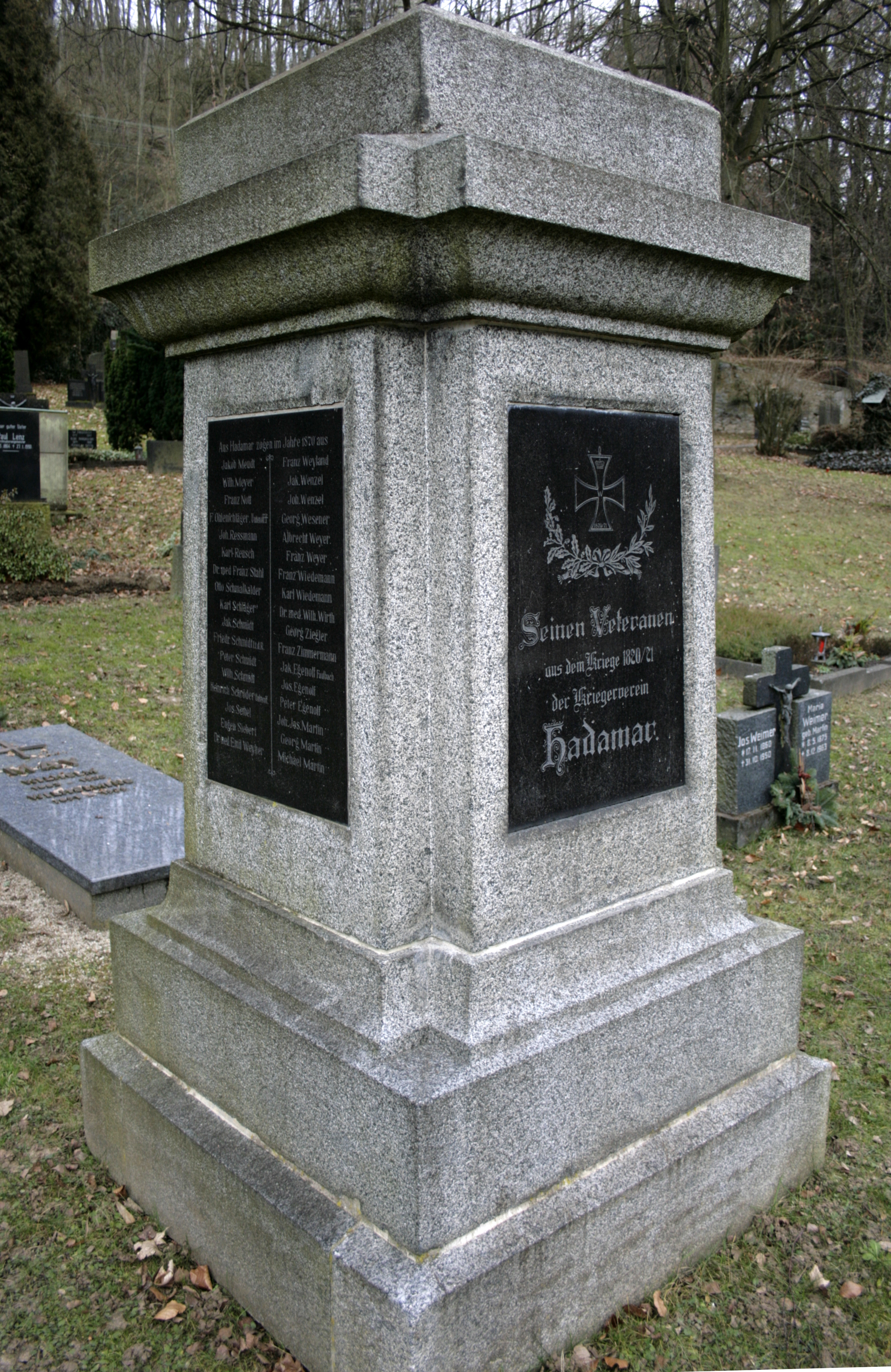 Denkmal für die Teilnehmerdes Deutsch-französischen Krieges 1870/71 in Hadamar, Deutschland